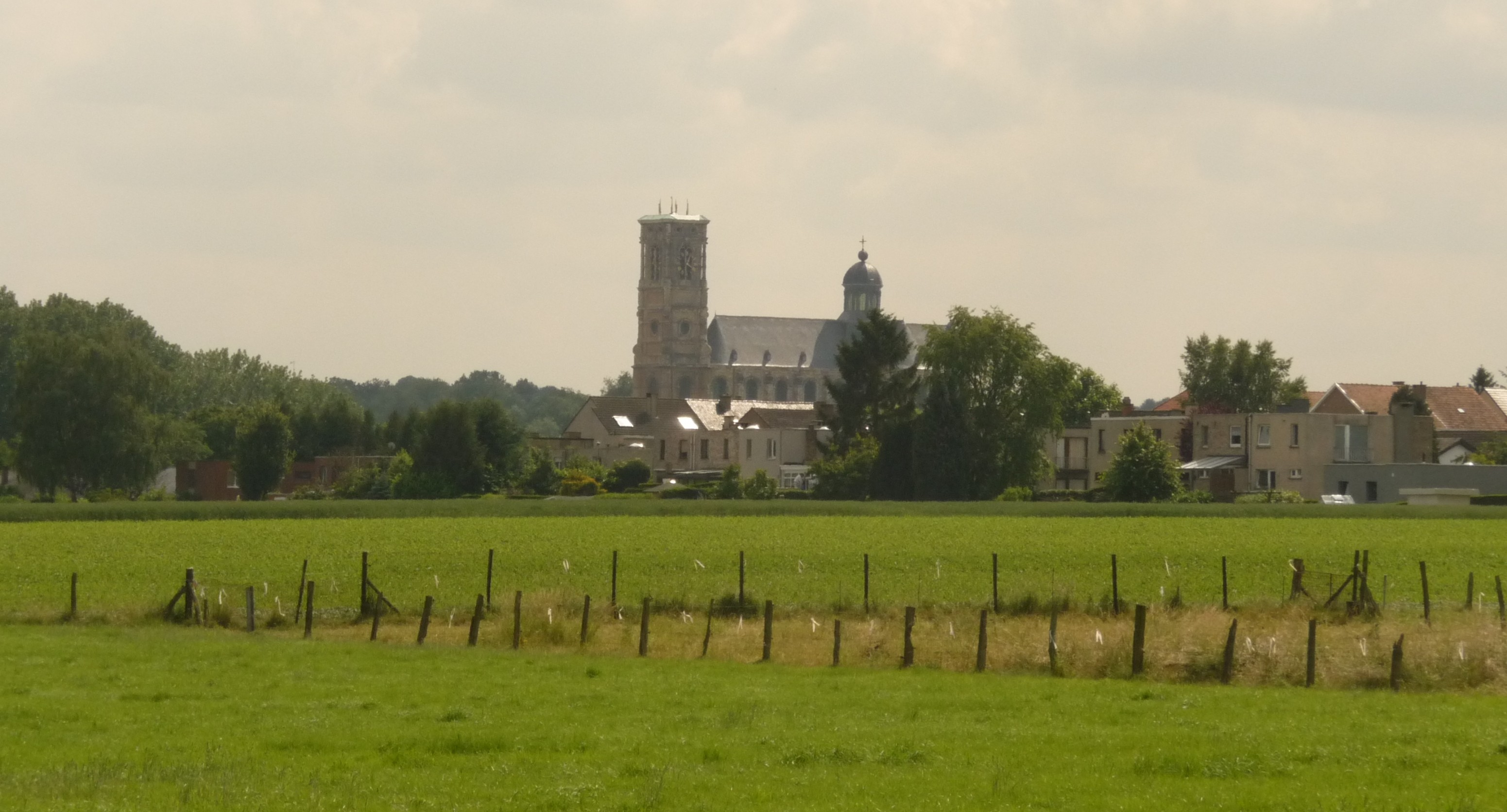 De Sint-Servaasbasiliek (Abdijkerk Grimbergen) gezien vanaf de kleine ingang van het Lintbos.